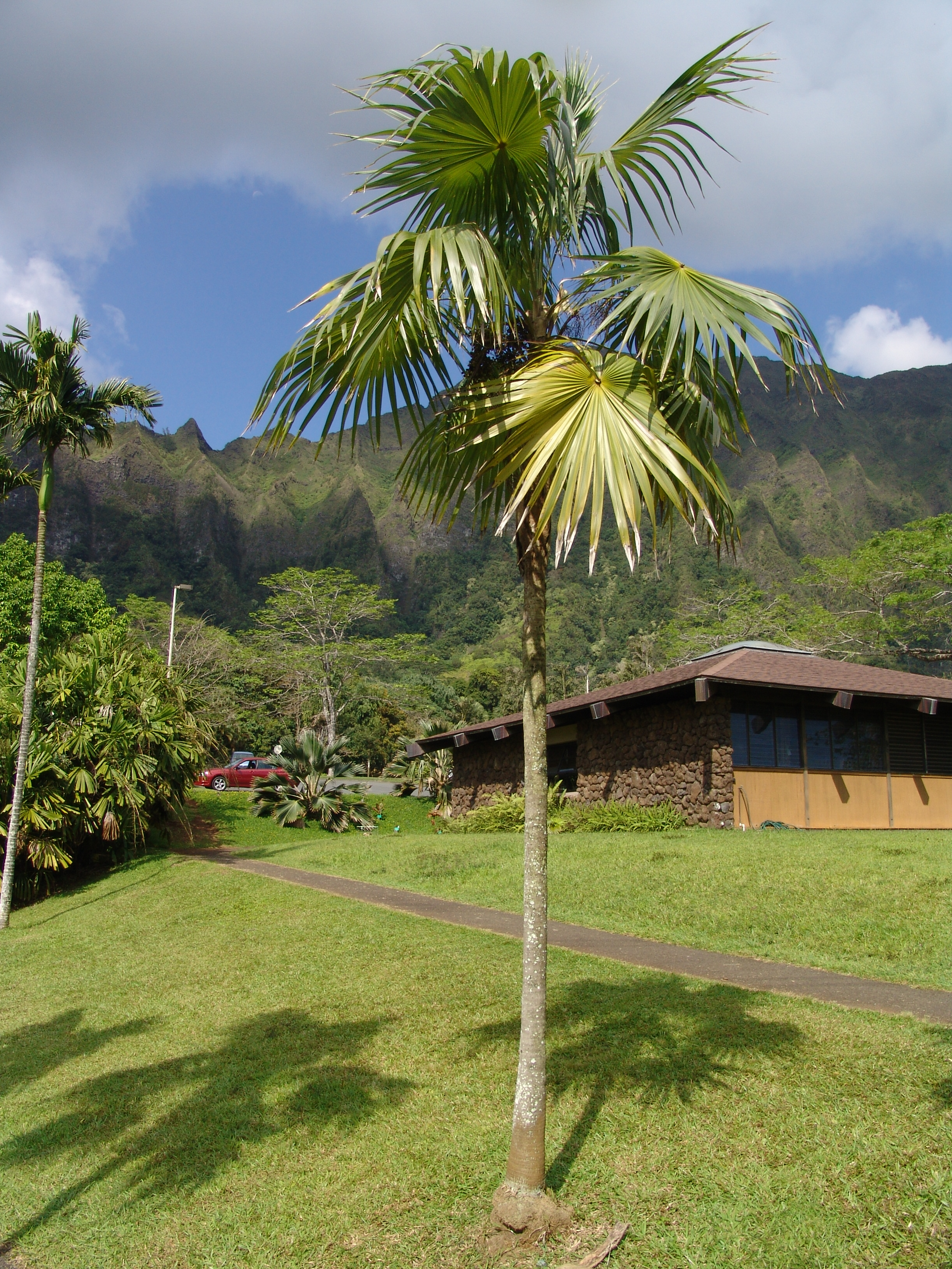 Thrinax radiataHo'omaluhia Botanical Garden Oahu Hawaii